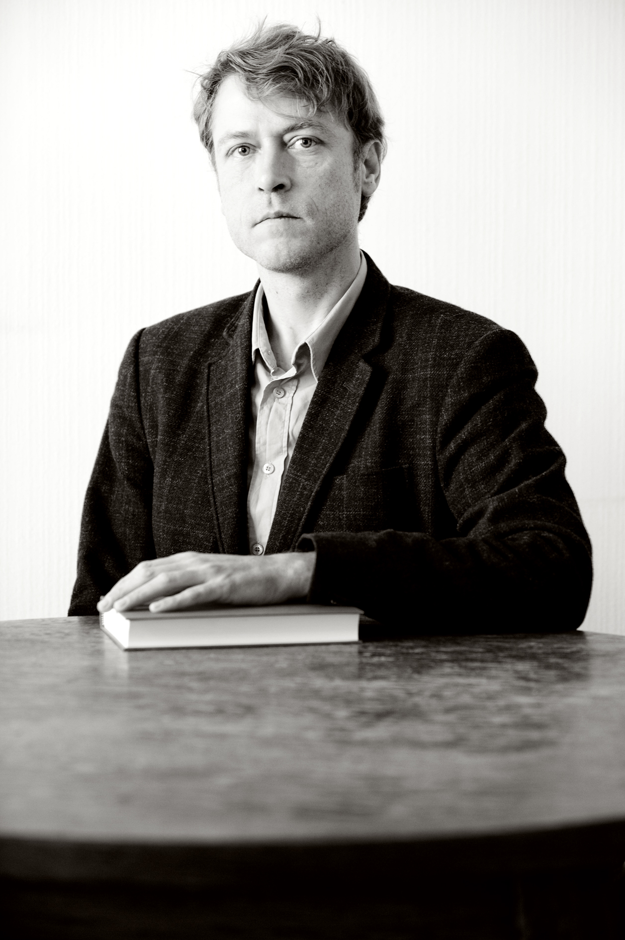 De schrijver Yves Petry